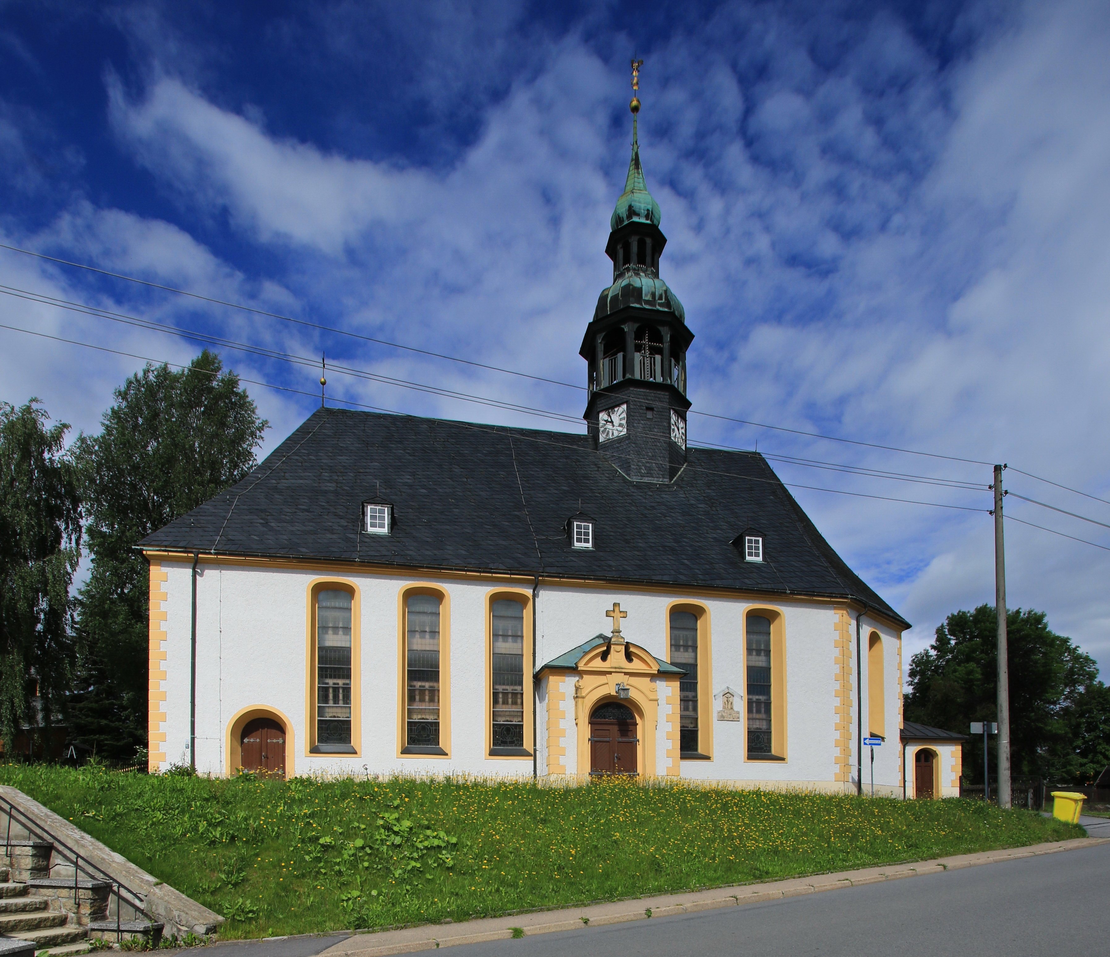 Kirche Neudorf im Erzgebirge in Sachsen .